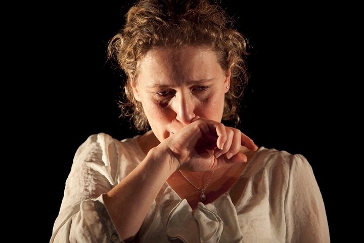 נדיה קוצ'ר בההצגה "בוגד"